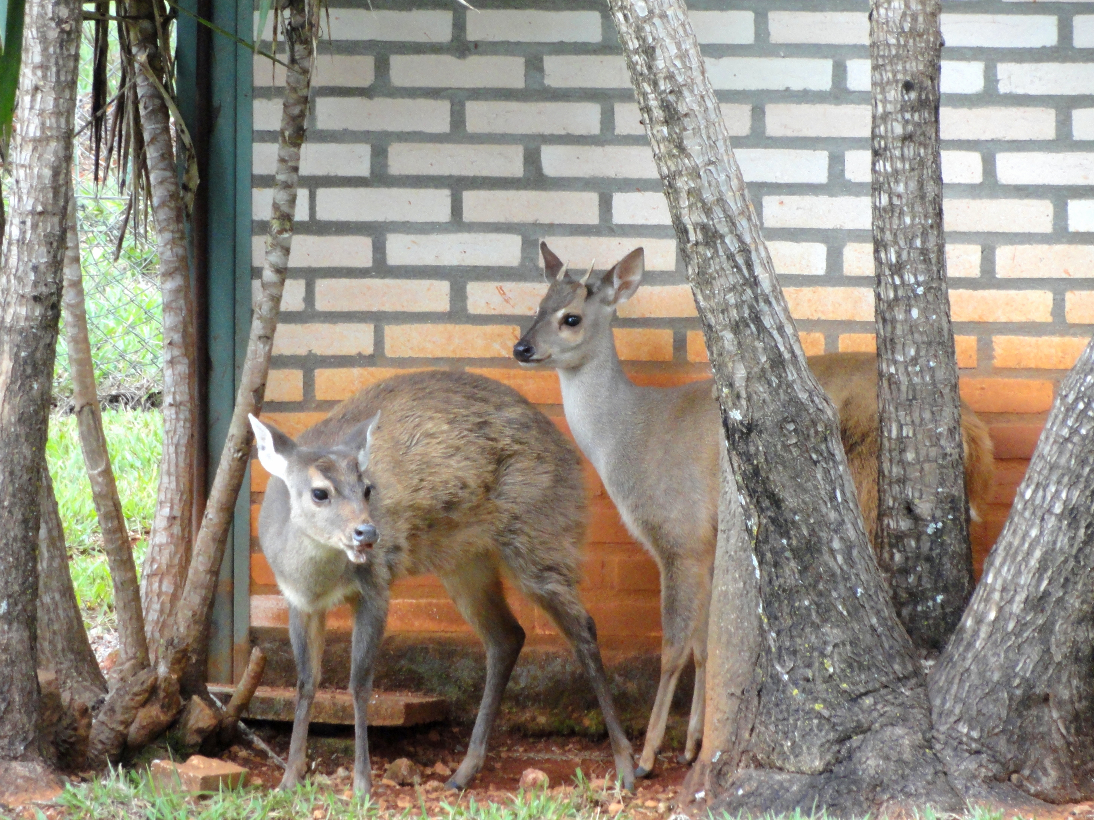 Jardim Zoológico de Brasília, Brasília, Brazil.